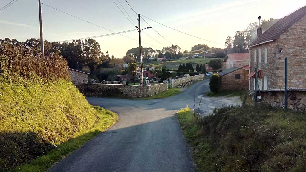 Vista da Rocha en Sedes, Narón.